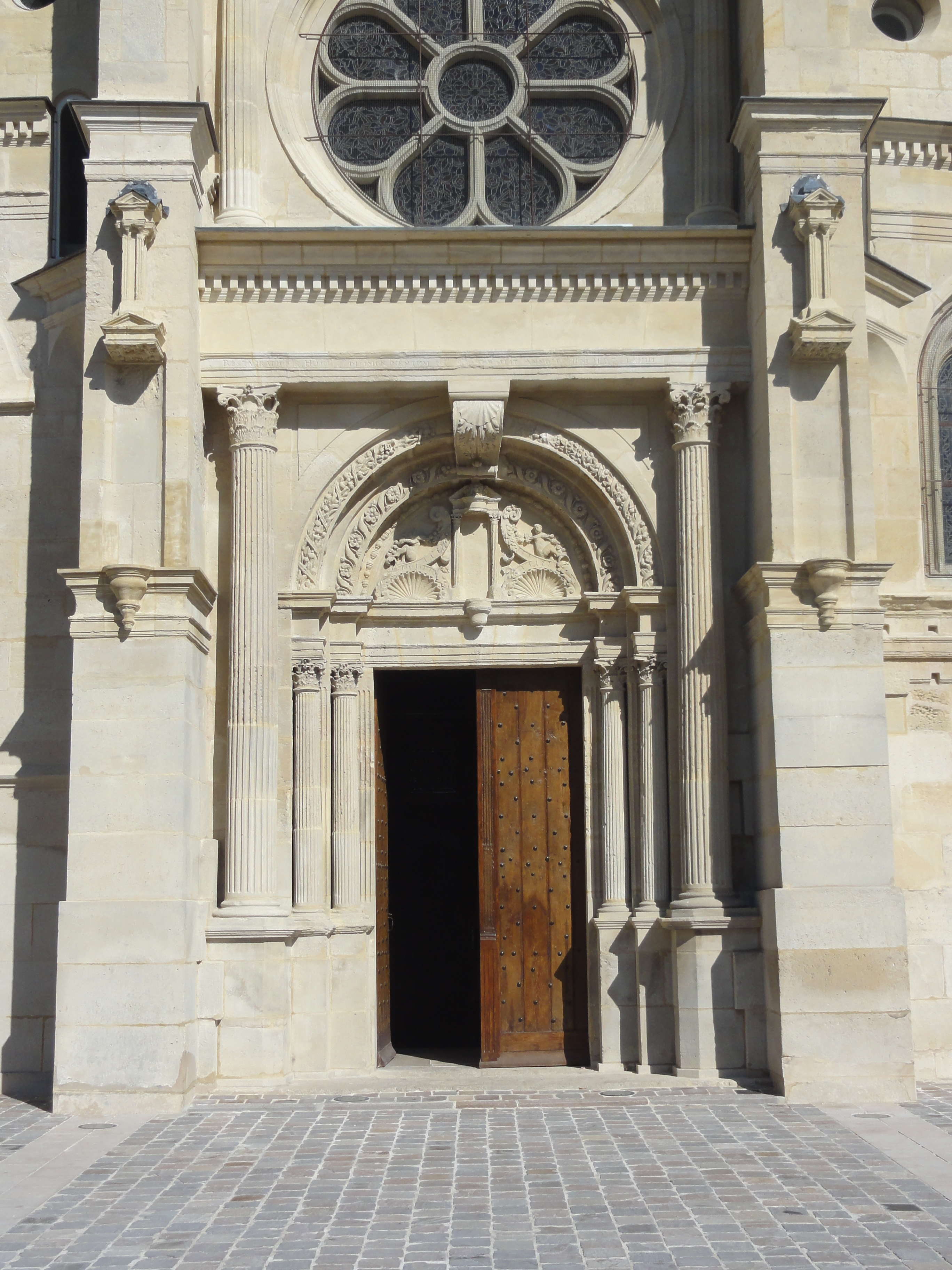 L'église Saint-Pierre-et-Saint-Paul de Sarcelles après sa restauration en 2014-2015 - voir titre.